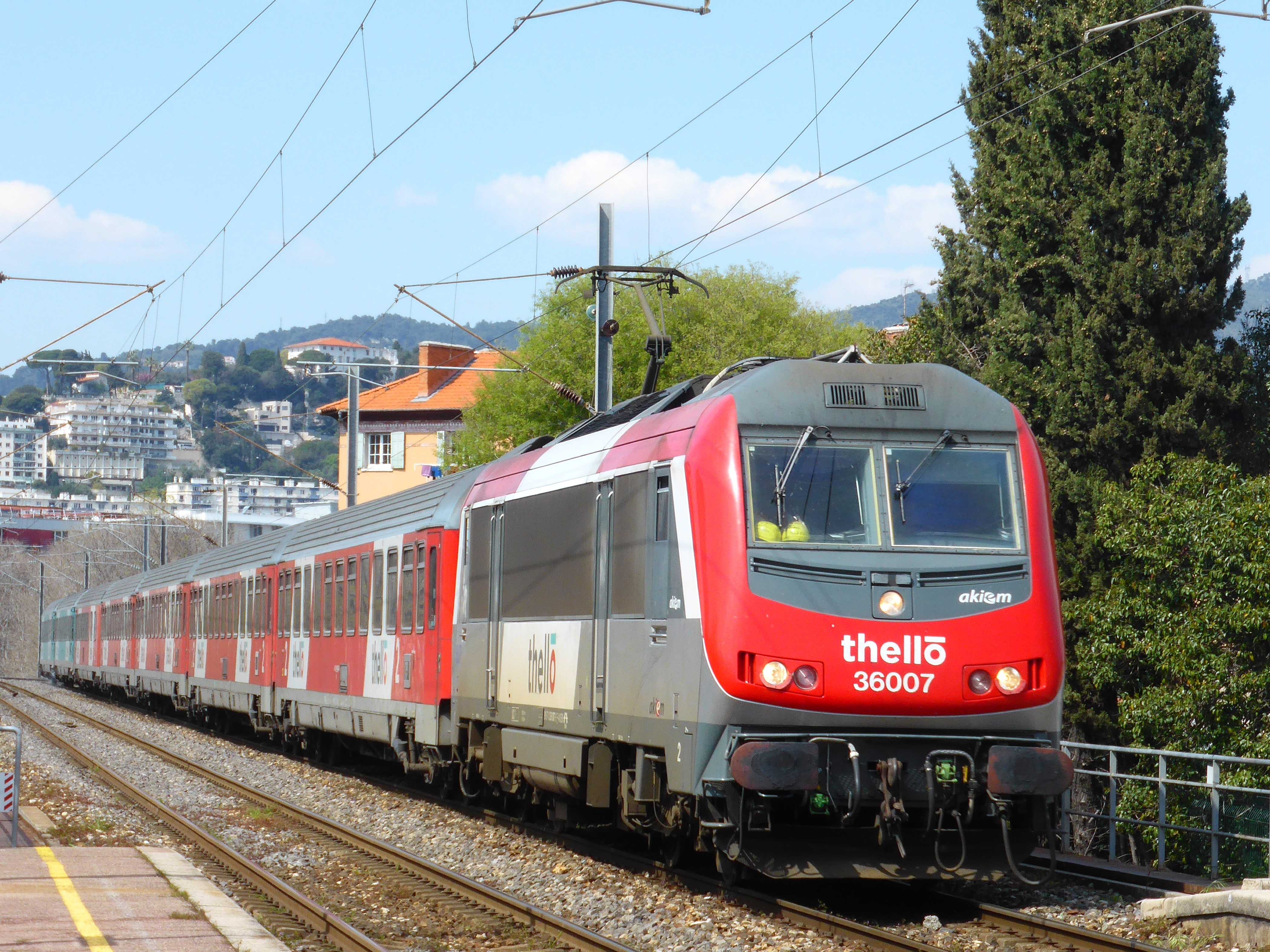 Train thello assurant le n°145 à destinaton de Milan, passant la gare de Riquier